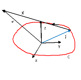 ИНтеграција по затвореној струјној контури